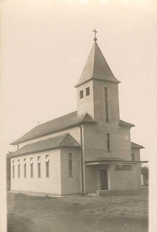 1937 Kostol Exterier